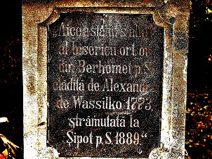 Gedenksstein für die Kirche in Berhometh, die Alexander Wassilko 1773 errichten ließ, die sein Namensvetter der Freiherren1889 wegen eines Neubaus abtrug und in Szypot wieder aufbaute.